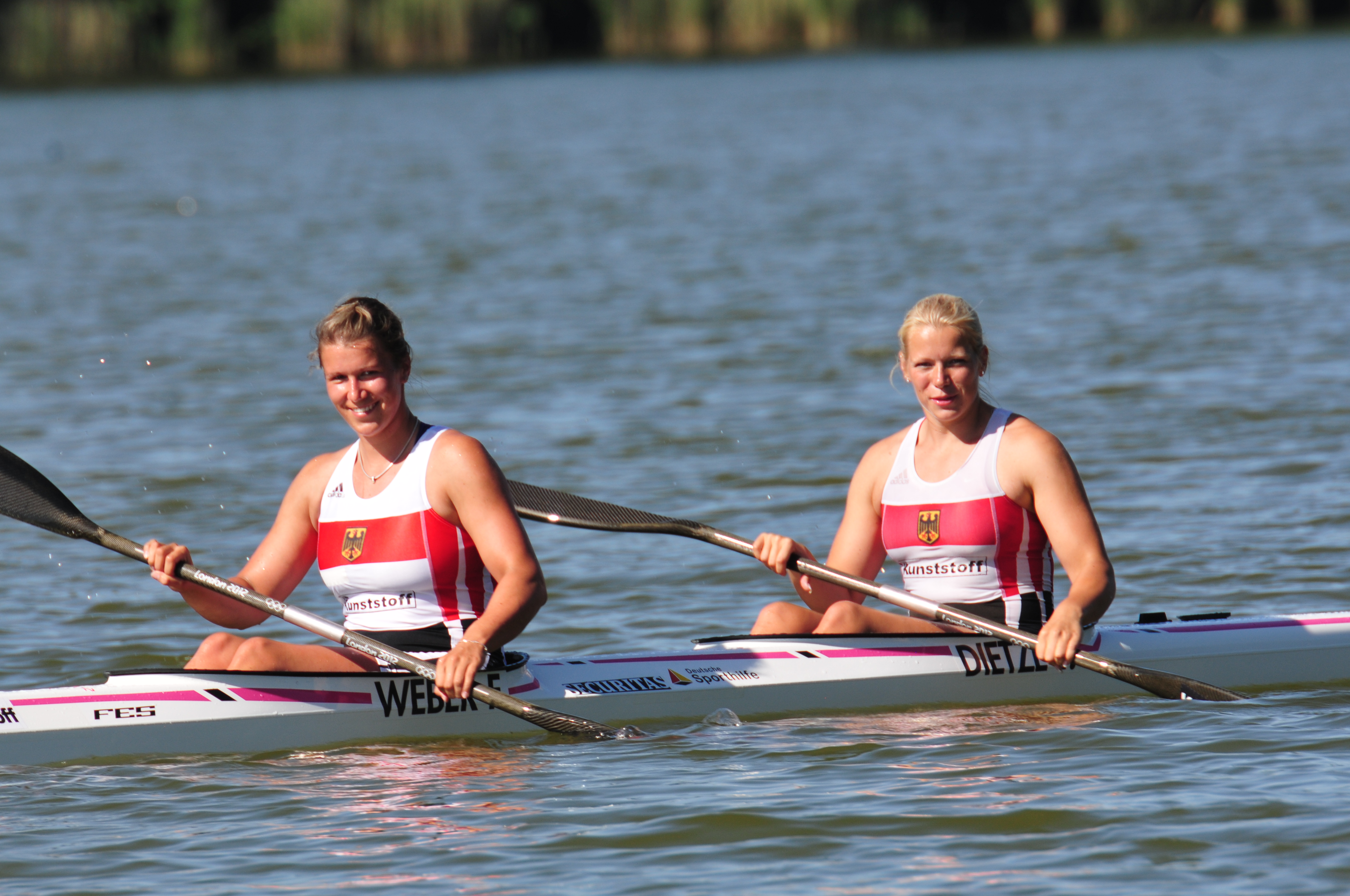 Bundesleistungszentrum Kienbaum; Training Kanuten